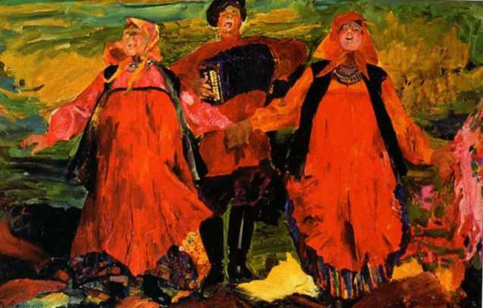 Филипп Малявин "Поющие крестьяне"